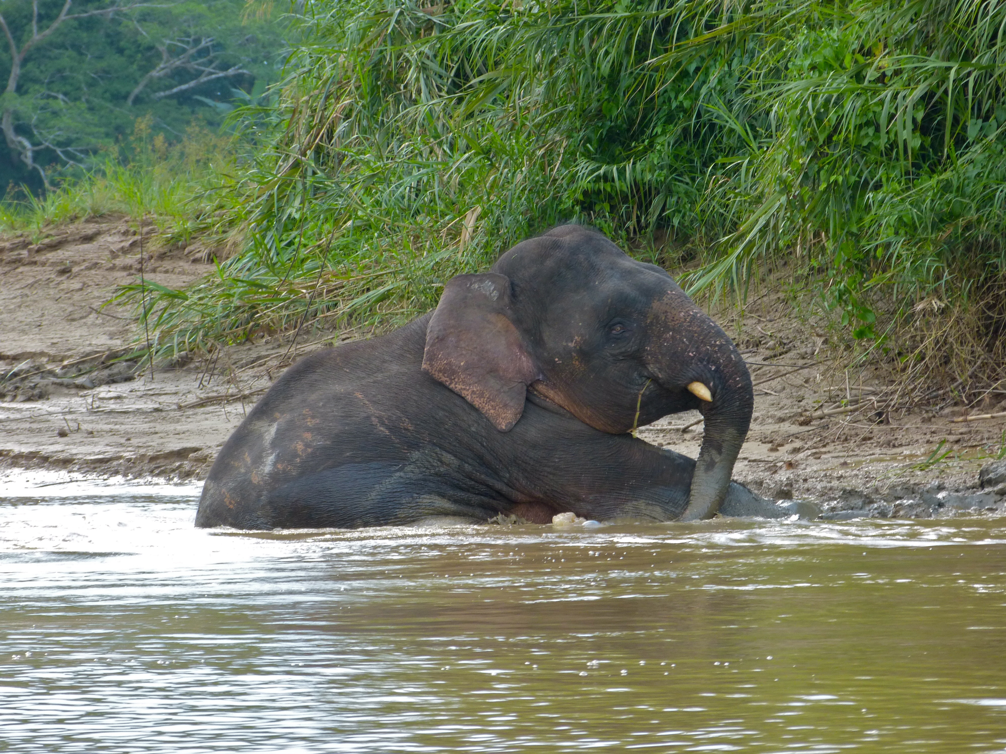 Kinabatangan River, Sukau, Sabah, MALAYSIA